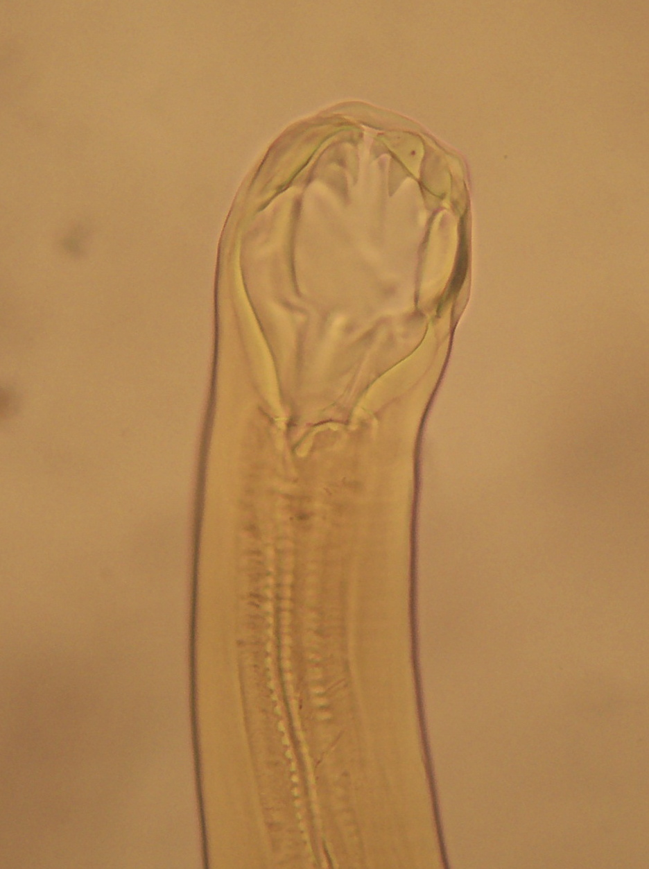 Boca y cuello del parásito Ancylostoma duodenale